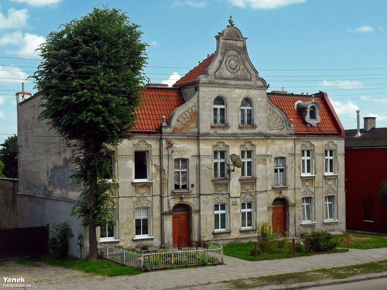 Kamienica z nr 201, widziana z kierunku płn - zachodniego.